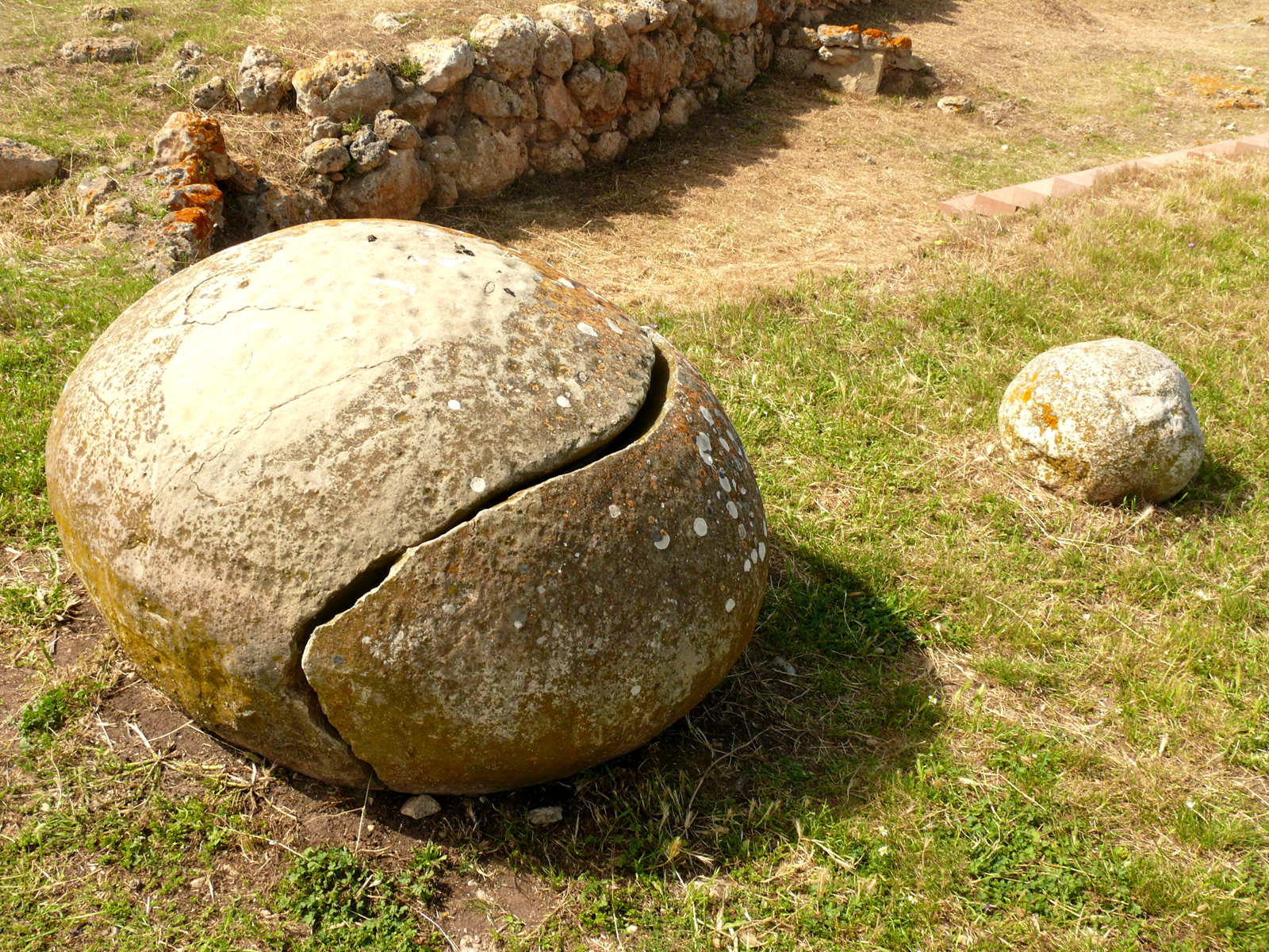 Altare prenuragico di Monte D' Accoddi (Sassari, Sardegna)